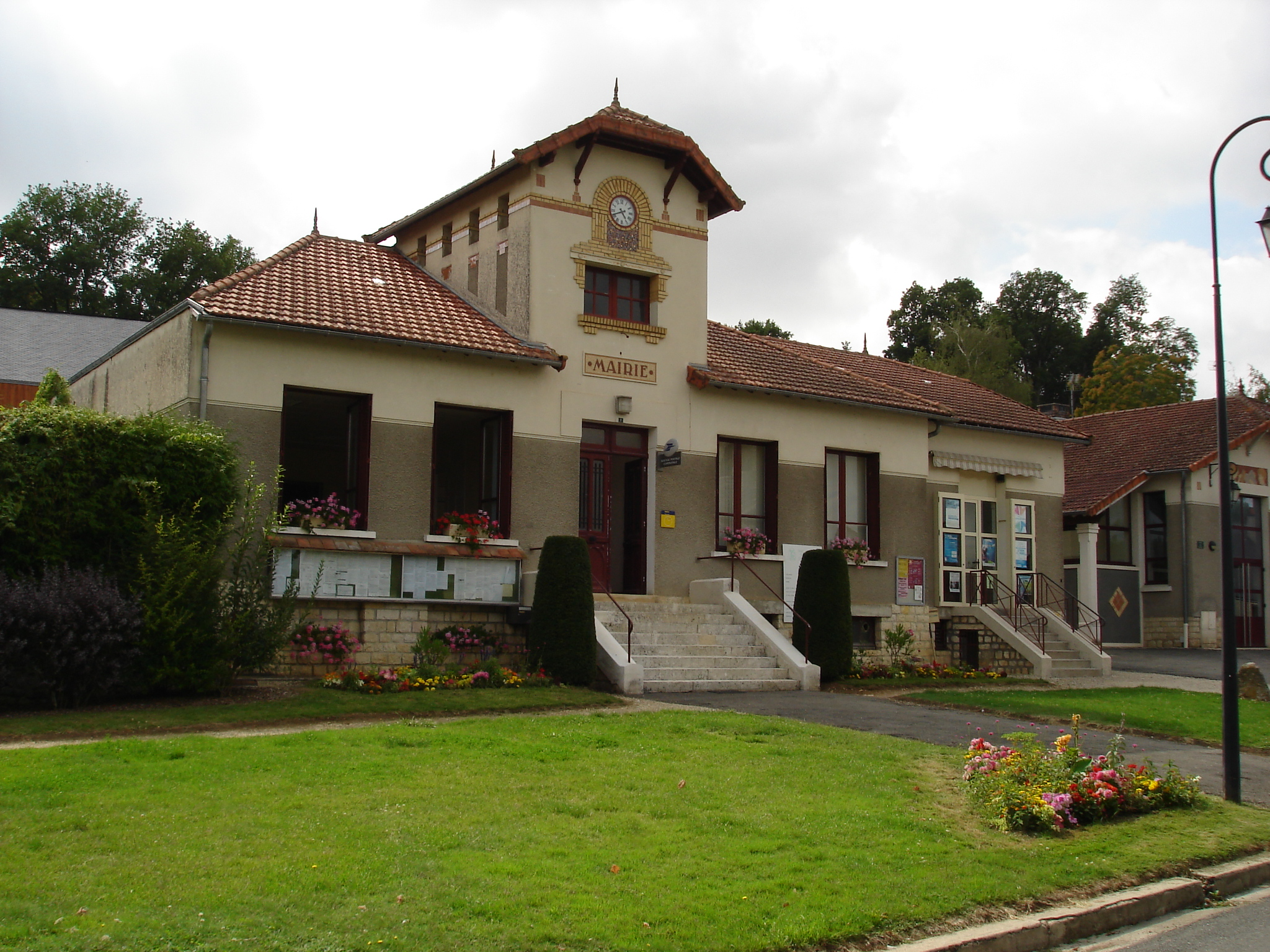 Lurais (36) : La mairie.